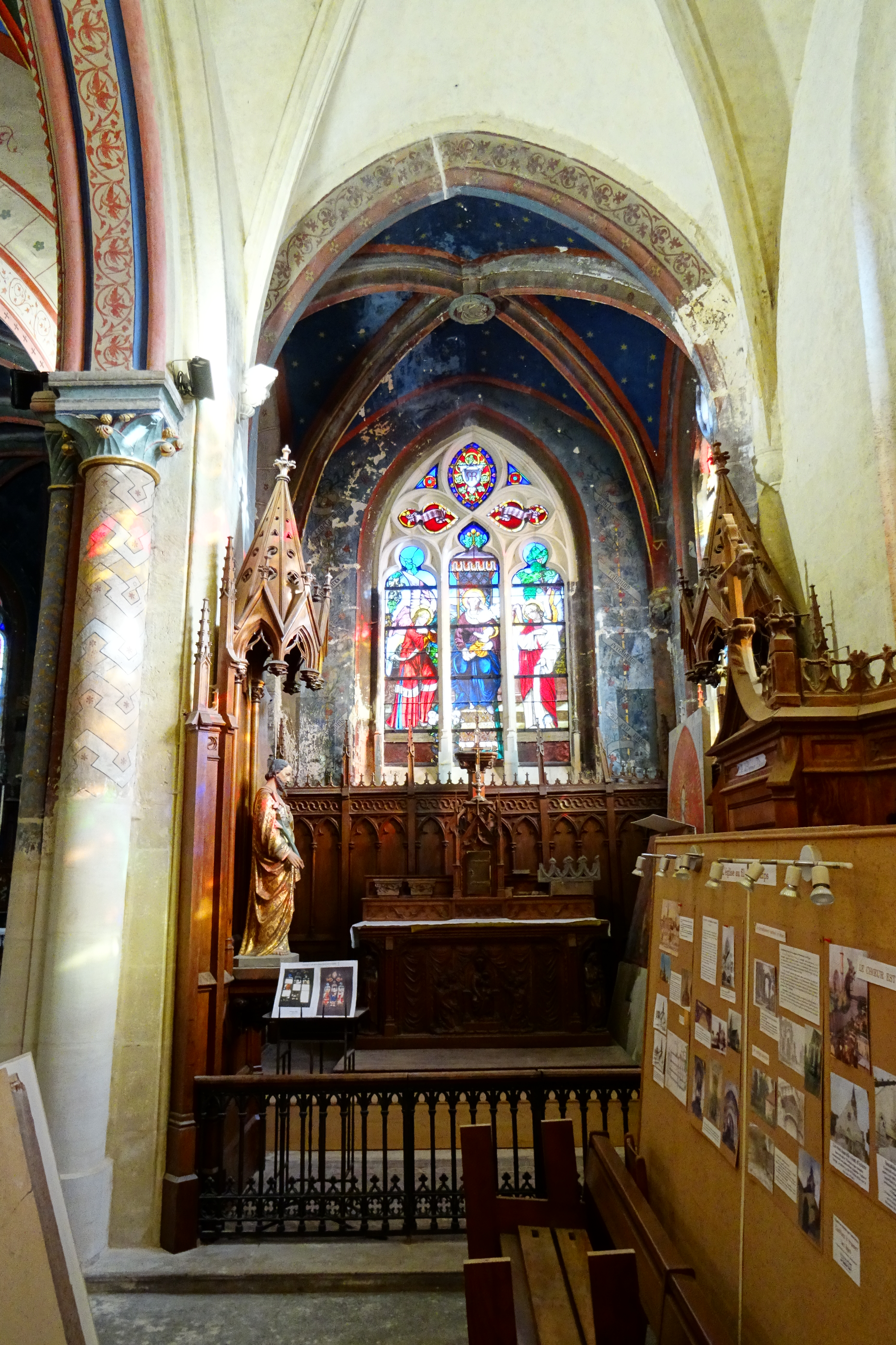 Intérieur de l'église - voir le titre du fichier.